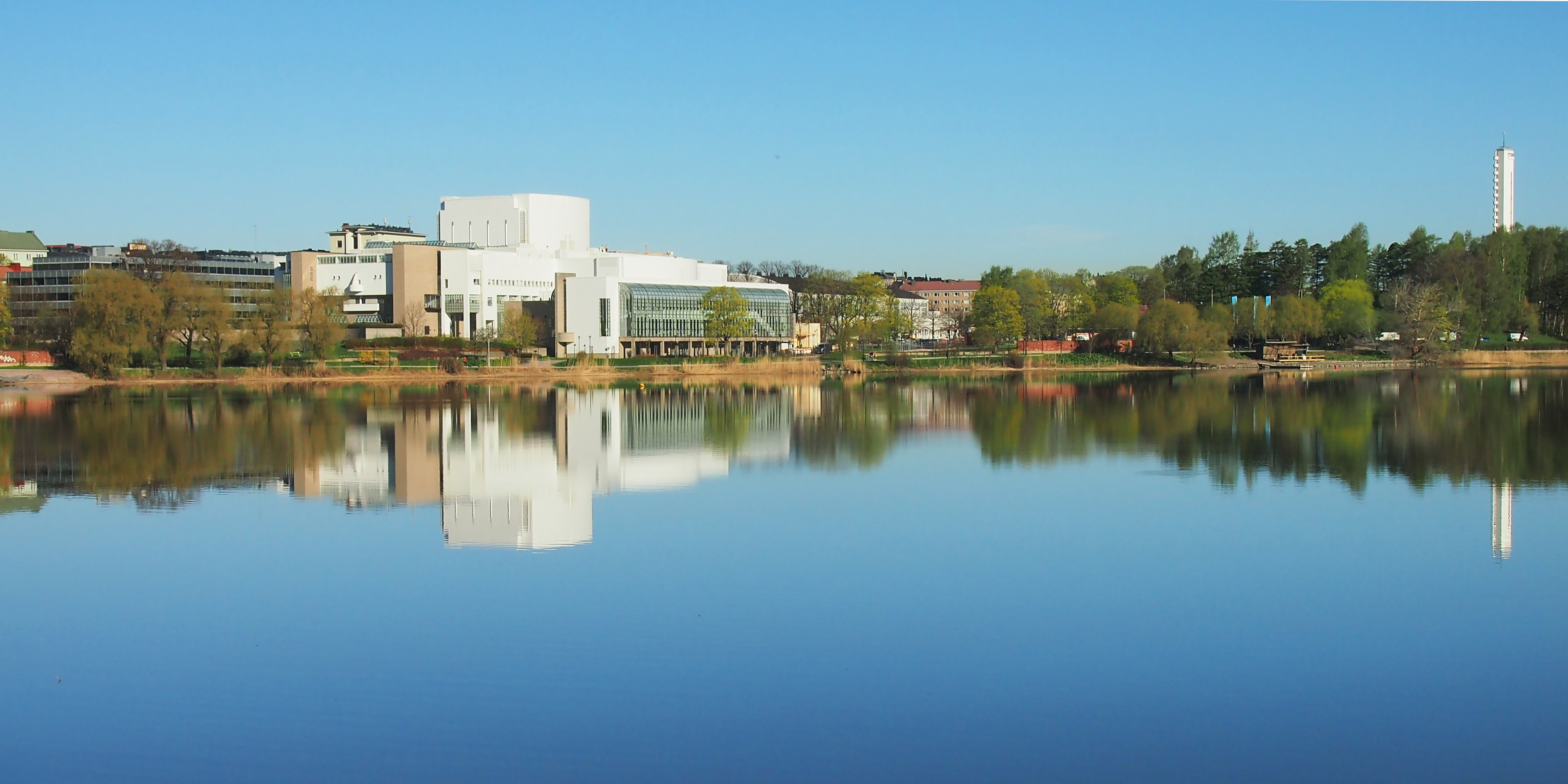 Oopperatalo ja Olympiastadionin torni kevätaamuna.